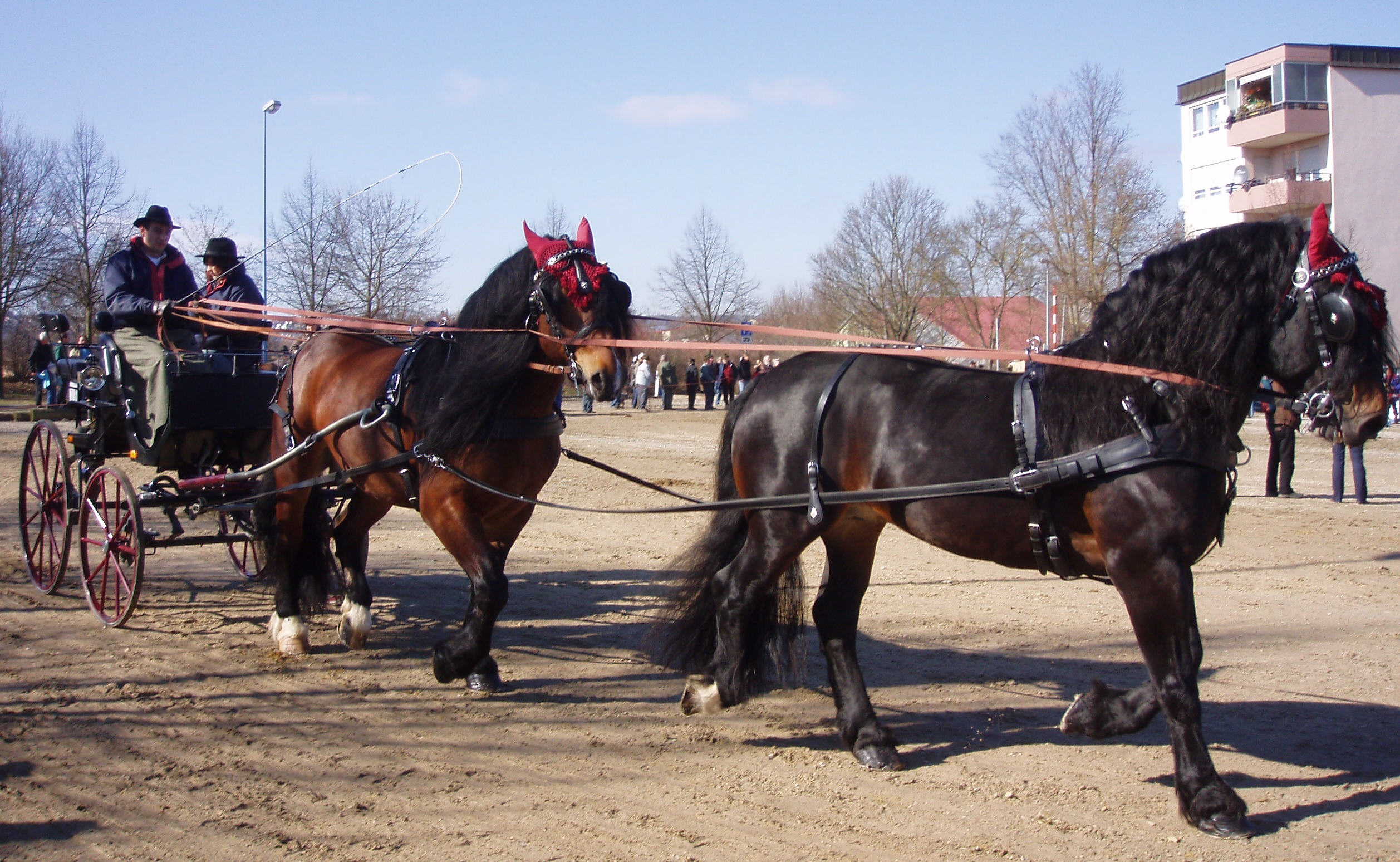 Noriker in Tandemanspannung